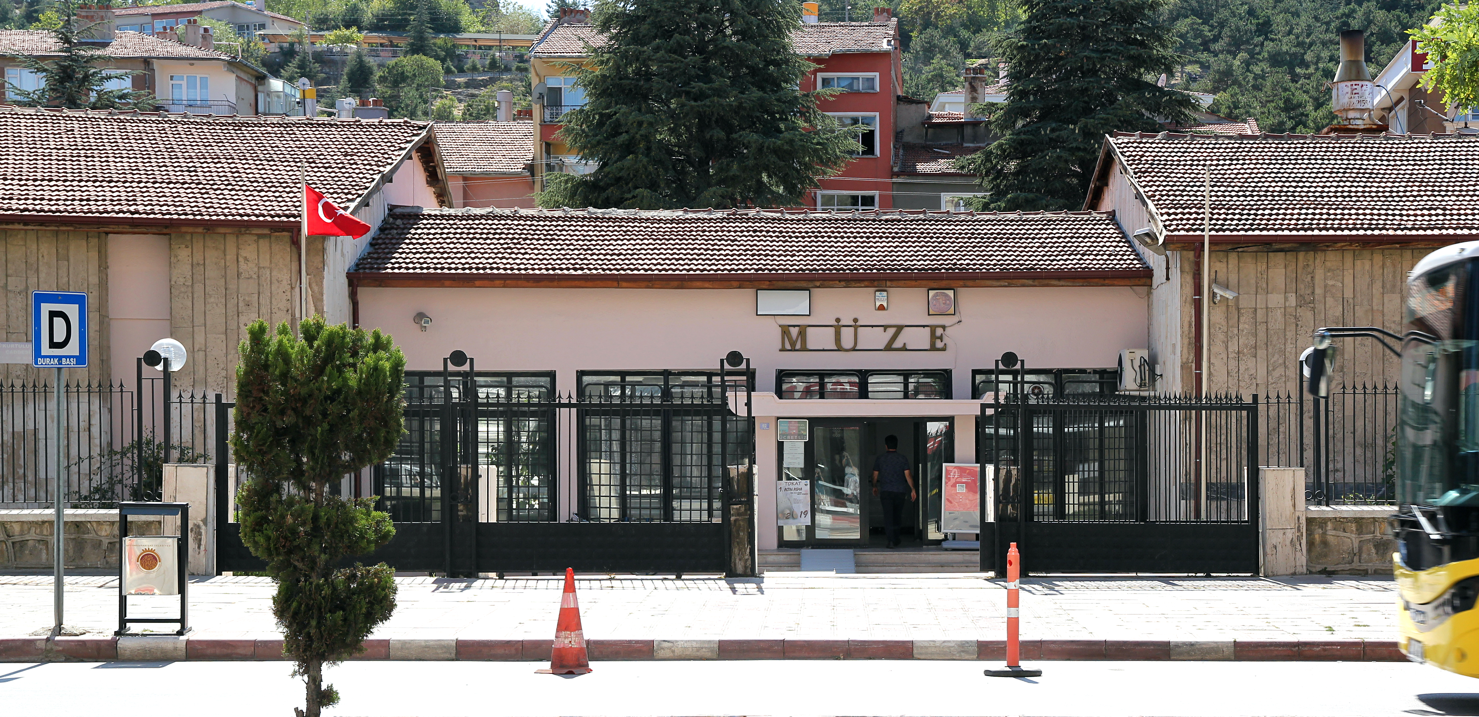 Archäologisches Museum, Afyonkarahisar, Zentraltürkei